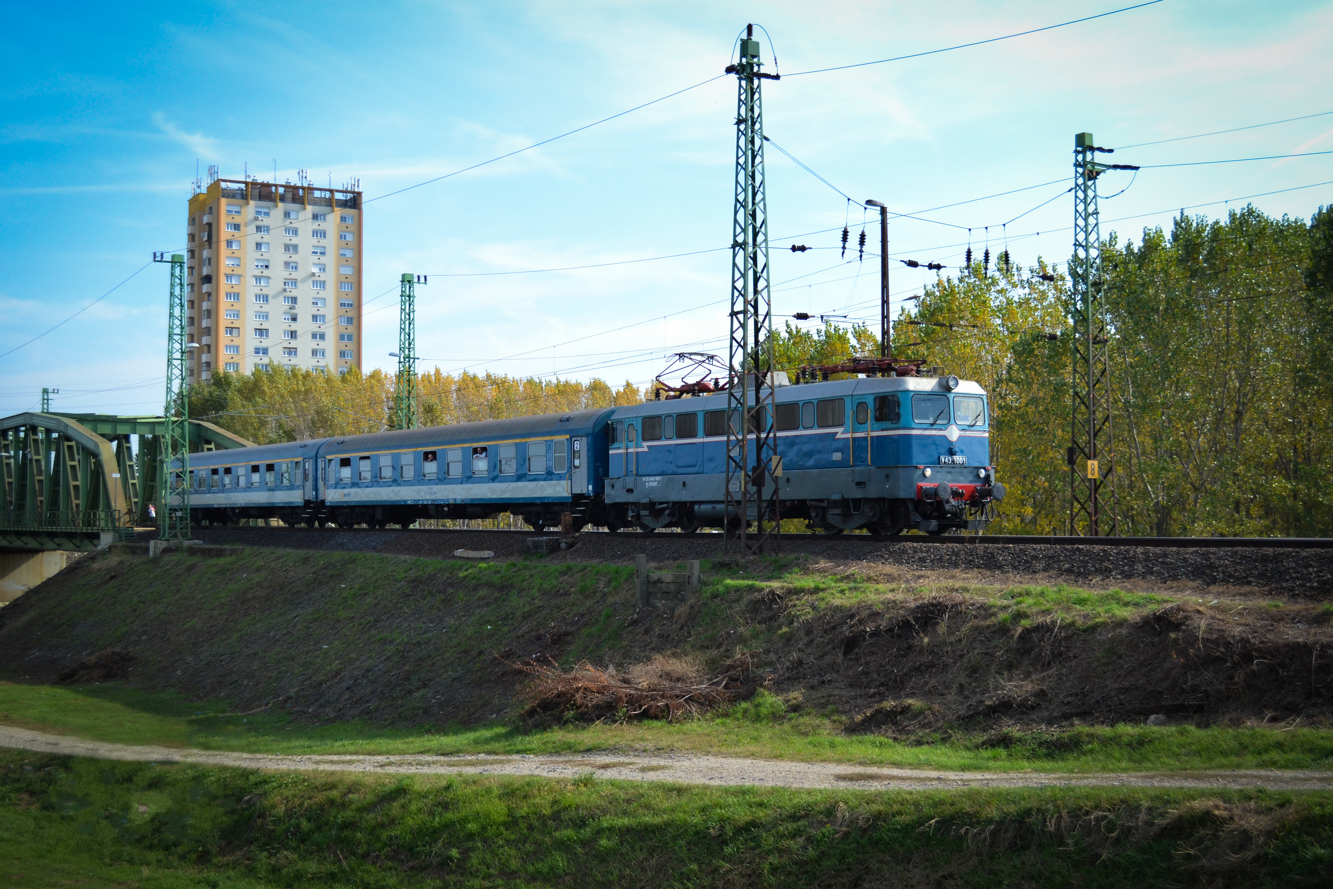 A V43 001-es Szili Mezőtúr-Szolnok viszonylatú vonatával halad Szolnok állomásra